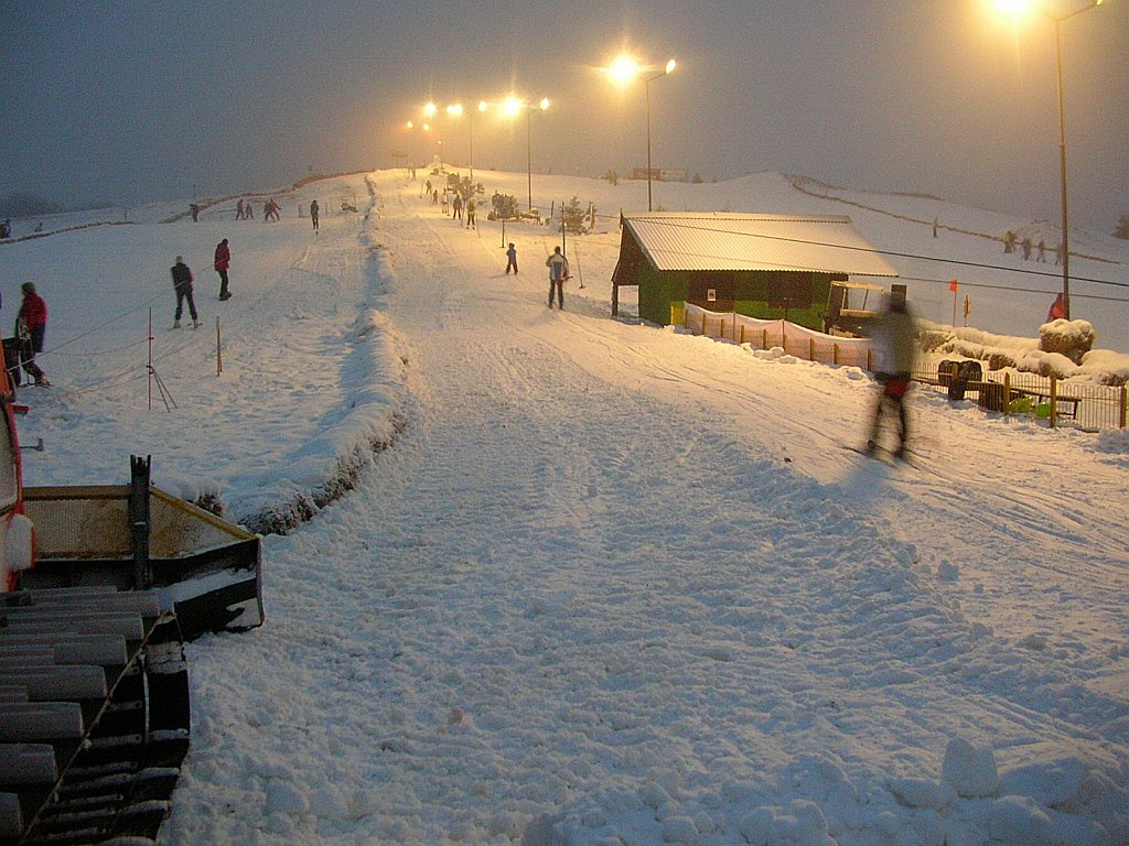 Stok narciarski w Myślęcinku